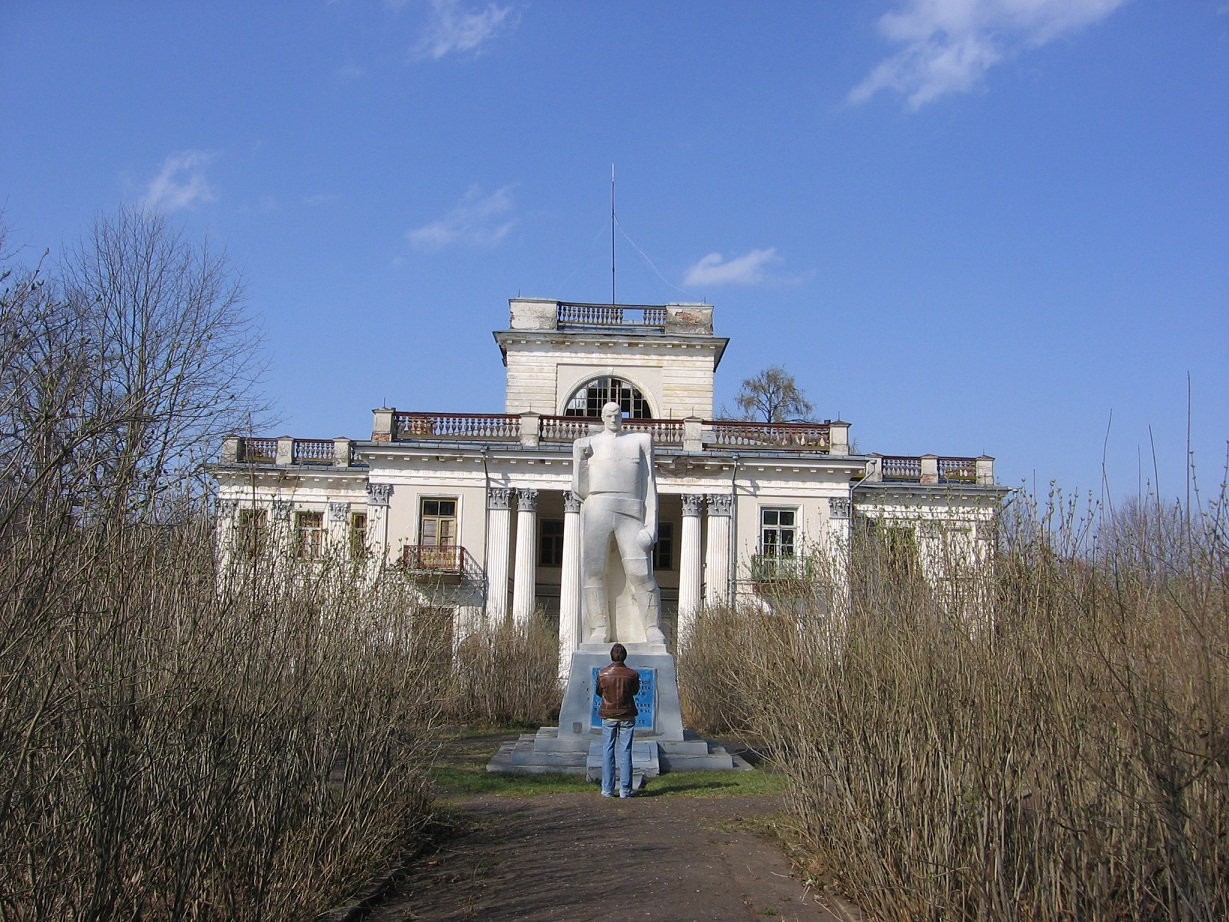 Беларуская (тарашкевіца): Сядзіба в. Жамыслаўль: палац графа Умястоўскага, зменшаная копія Лазянкоўскага палаца ў Варшаве This is a photo of Belarusian heritage monument. Reference number: 413Г000296 ( WLM)